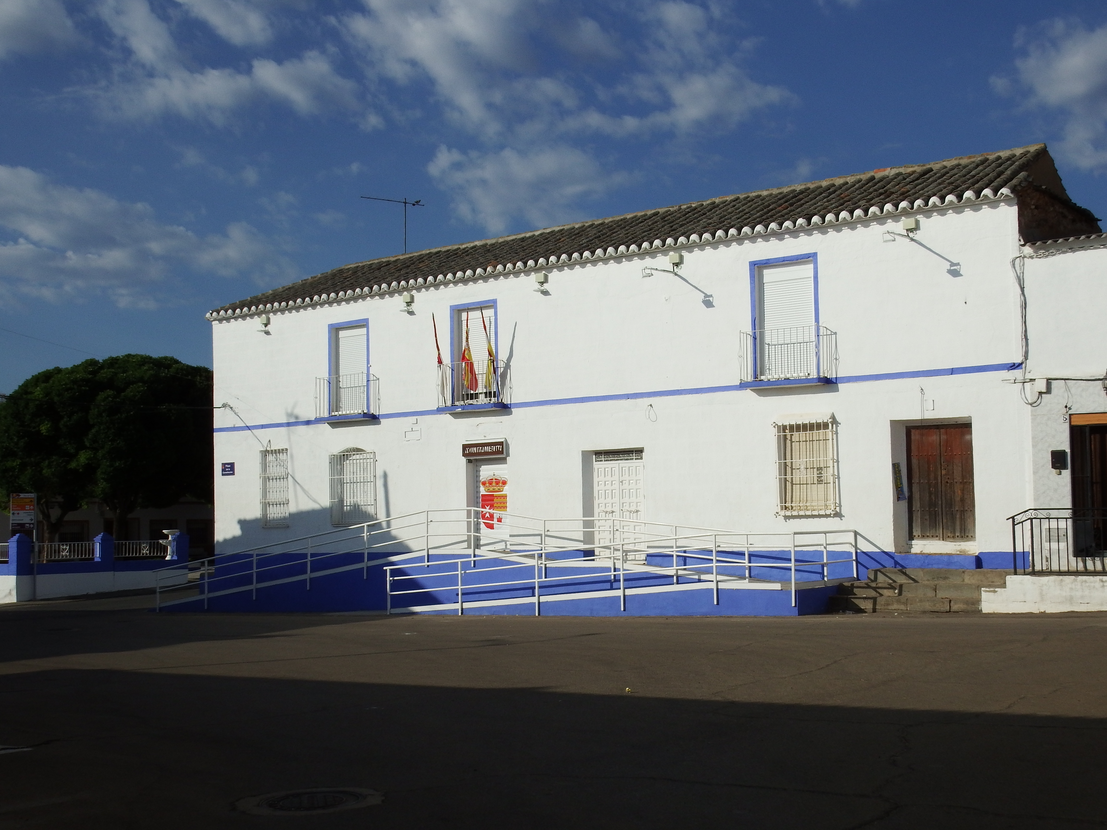 Villar del Pozo, Ayuntamiento.